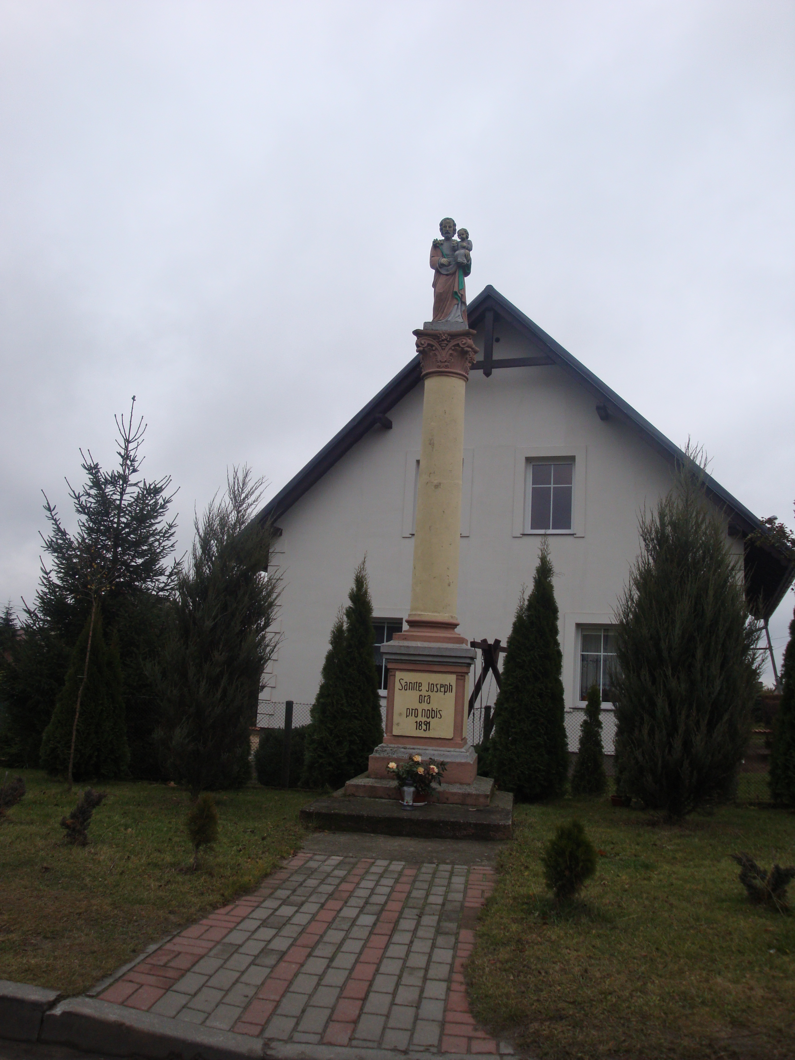 Village Pączewo